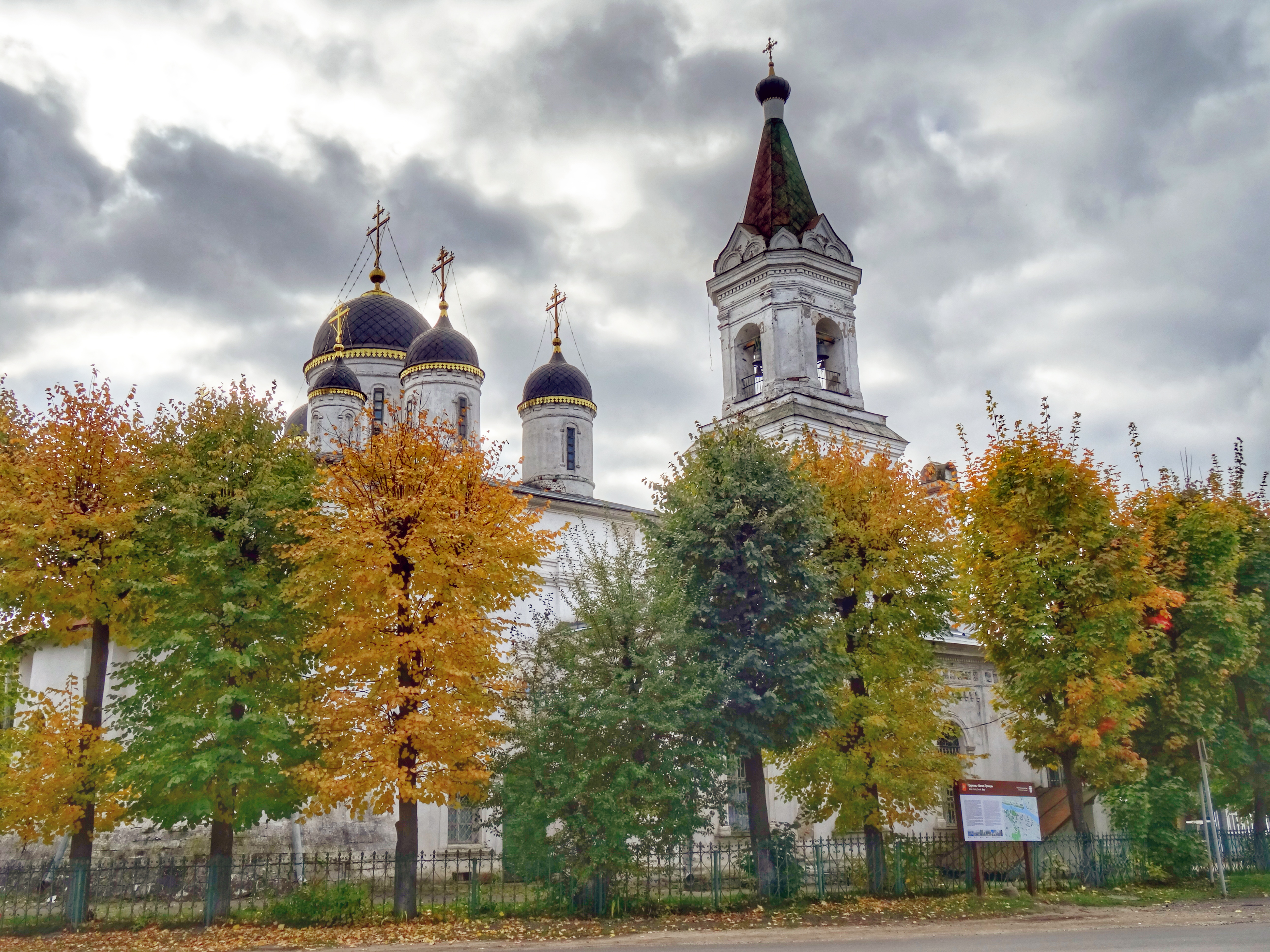 Церковь Белая Троица: улица Троицкая, 38 (угол улицы Энгельса и переулка Трудолюбия), Тверь, Тверская область